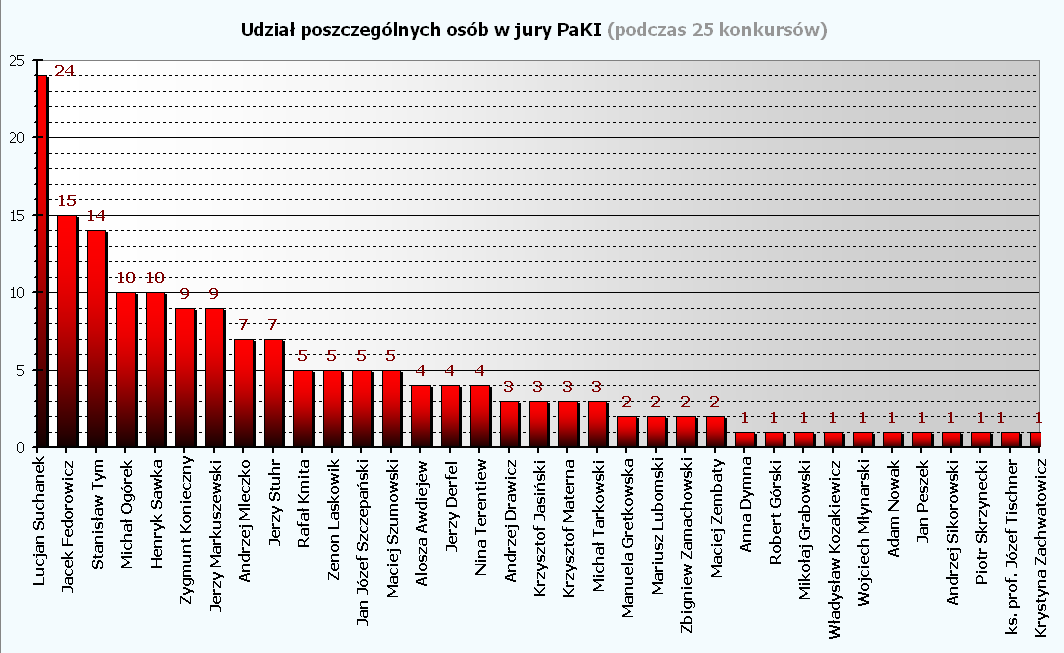 Statystyki PaKI (po 25 edycjach) - Statystyki JURY: skład osobowy.